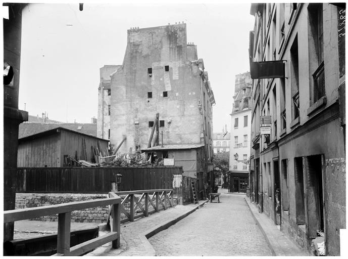 Vue des démolitions